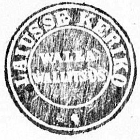 Laiuse kirikuvallavalitsuse pitsat. Üleslaadija koopia ja töötlus